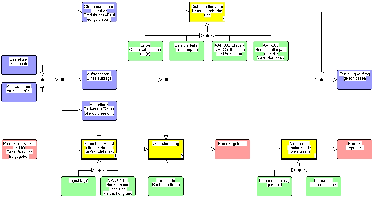 Screenshot eines Beispielmodells